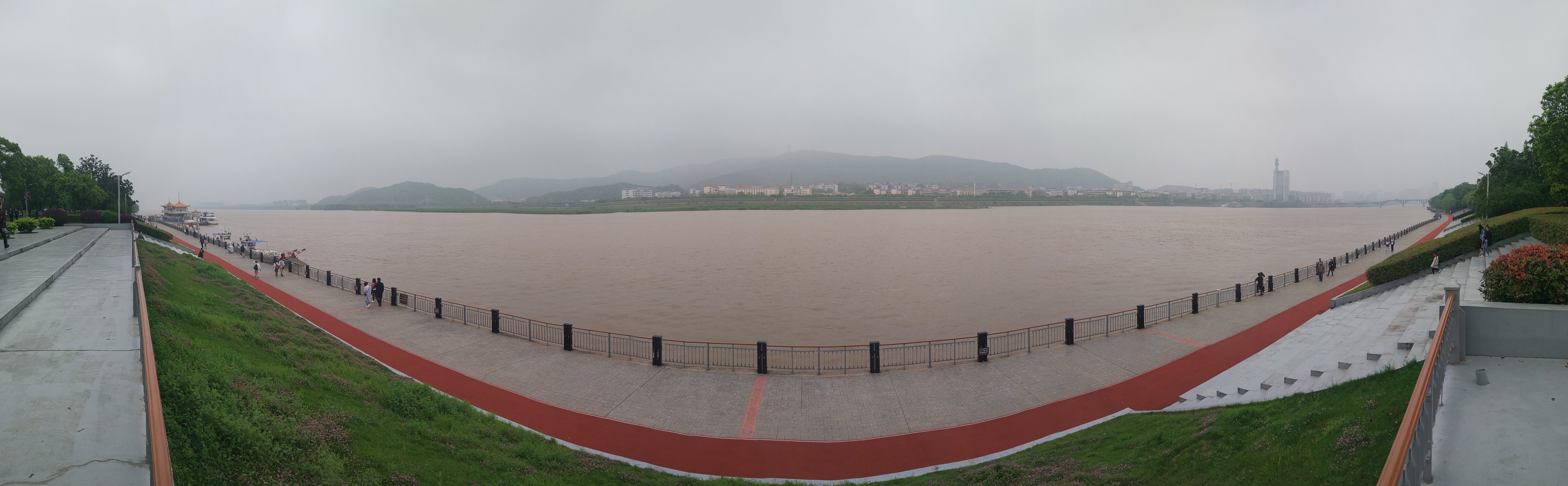 橘子洲头东全景照